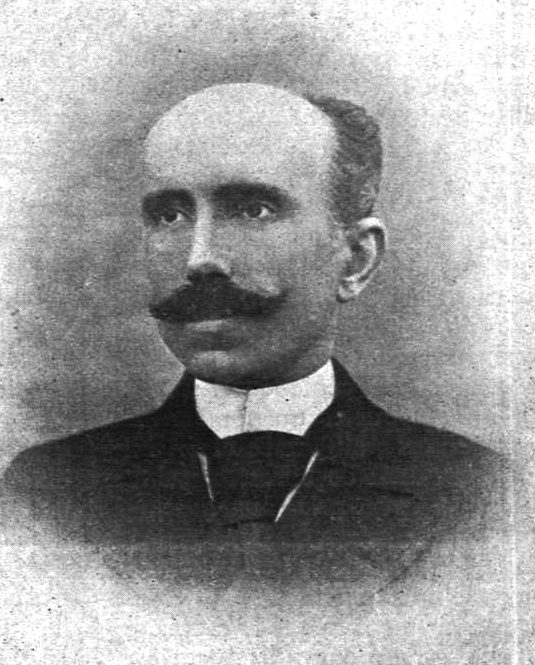 Ángel Urzáiz Cuesta